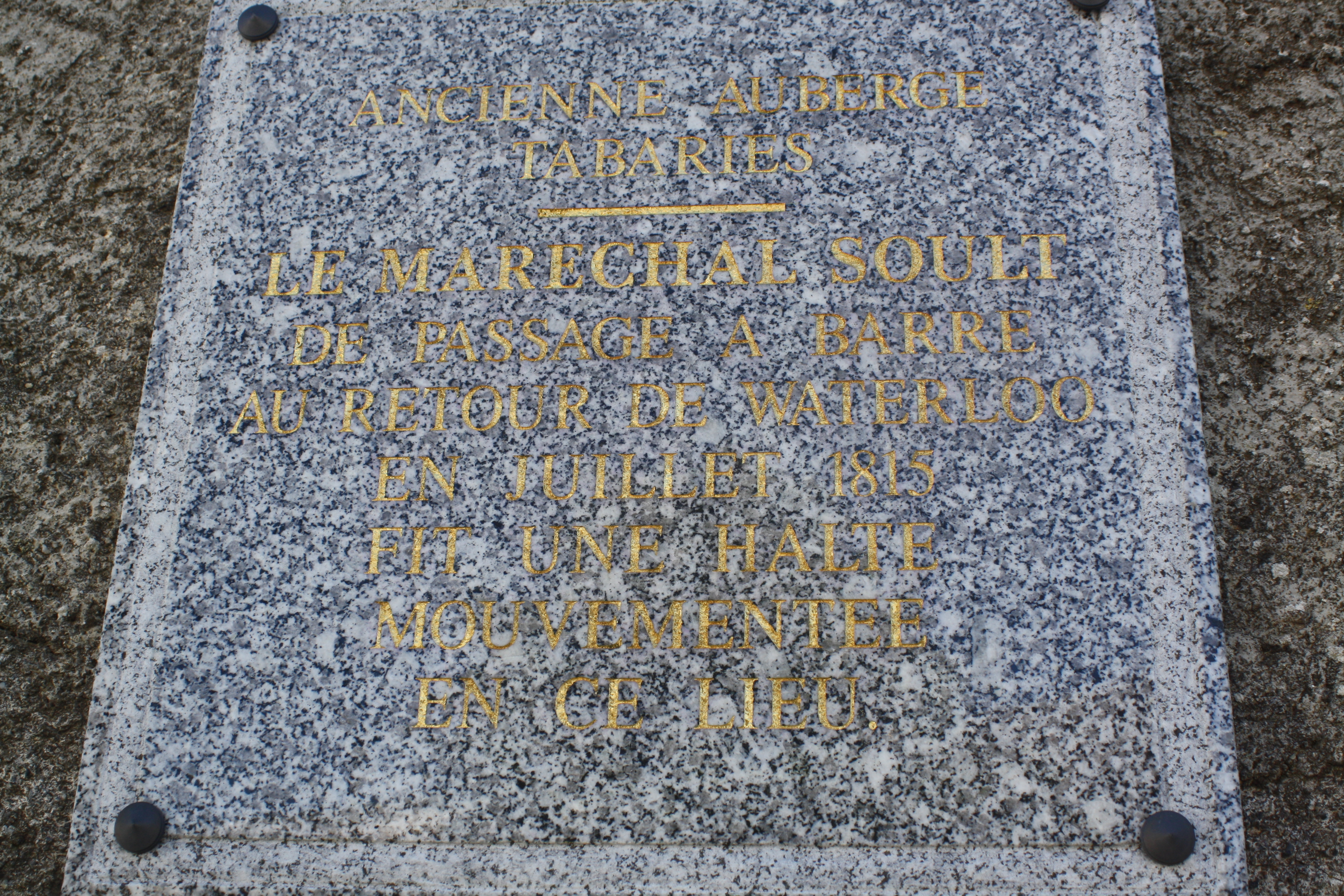 Barre (Tarn) - plaque posée sur l'ancienne auberge Tabaries, d'où s'est échappé en 1815 le Maréchal Soult de passage à Barre, de retour de Waterloo.